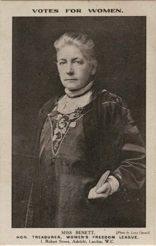 Sarah Benett, by Lena Connell (later Beatrice Cundy), published by Women's Freedom League halftone postcard print, 1909 4 3/4 in. x 3 in. (120 mm x 77 mm) image size Purchased, 2012 Photographs Collection NPG x136721